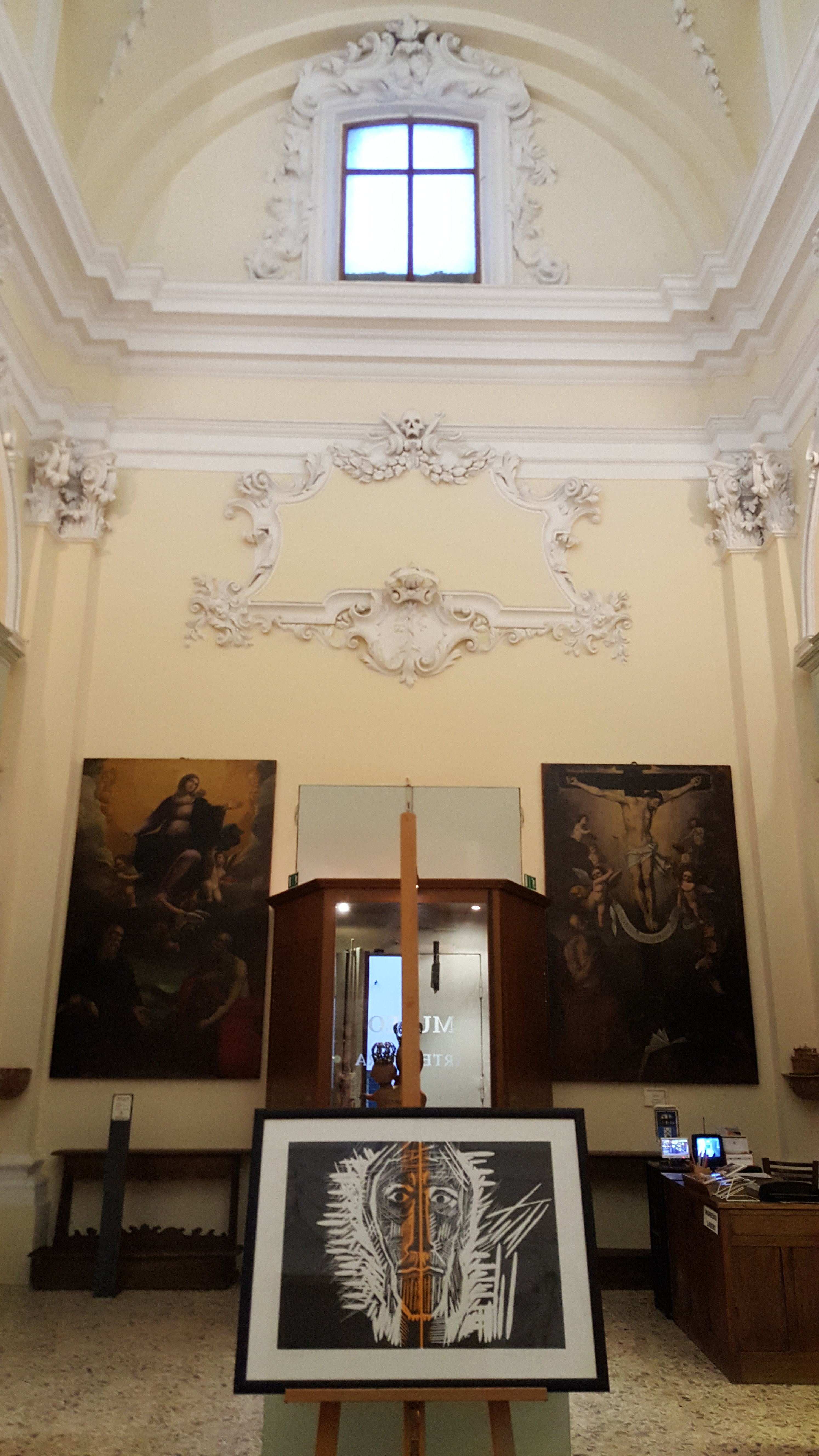 Museo di Saludecio e del Beato Amato This is a photo of a monument which is part of cultural heritage of Italy.